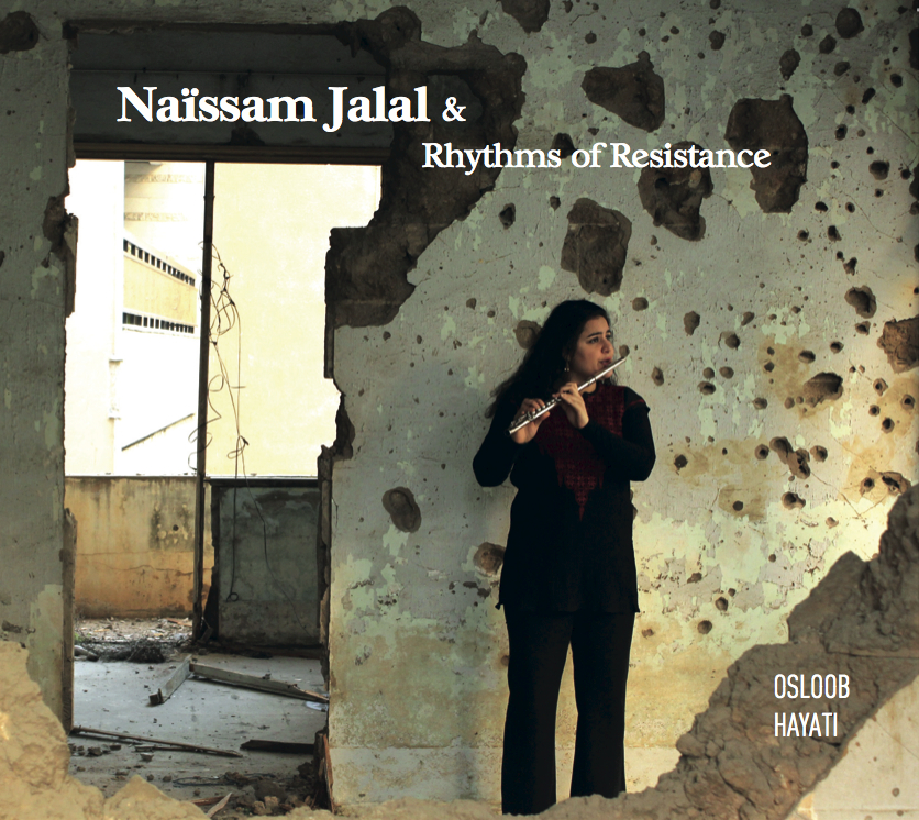 Naïssam Jalal & Rhythms of Resistance - pochette de l'album Osloob Hayati sorti en 2015 sur le label Les couleurs du son